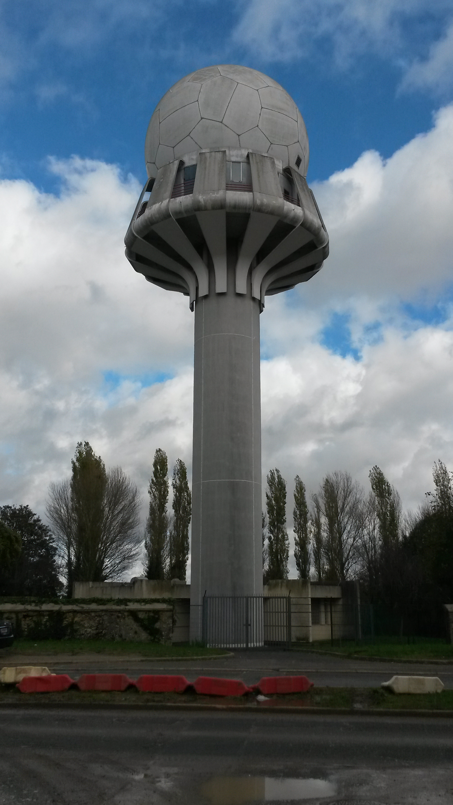 Palaiseau-Radar DGAC